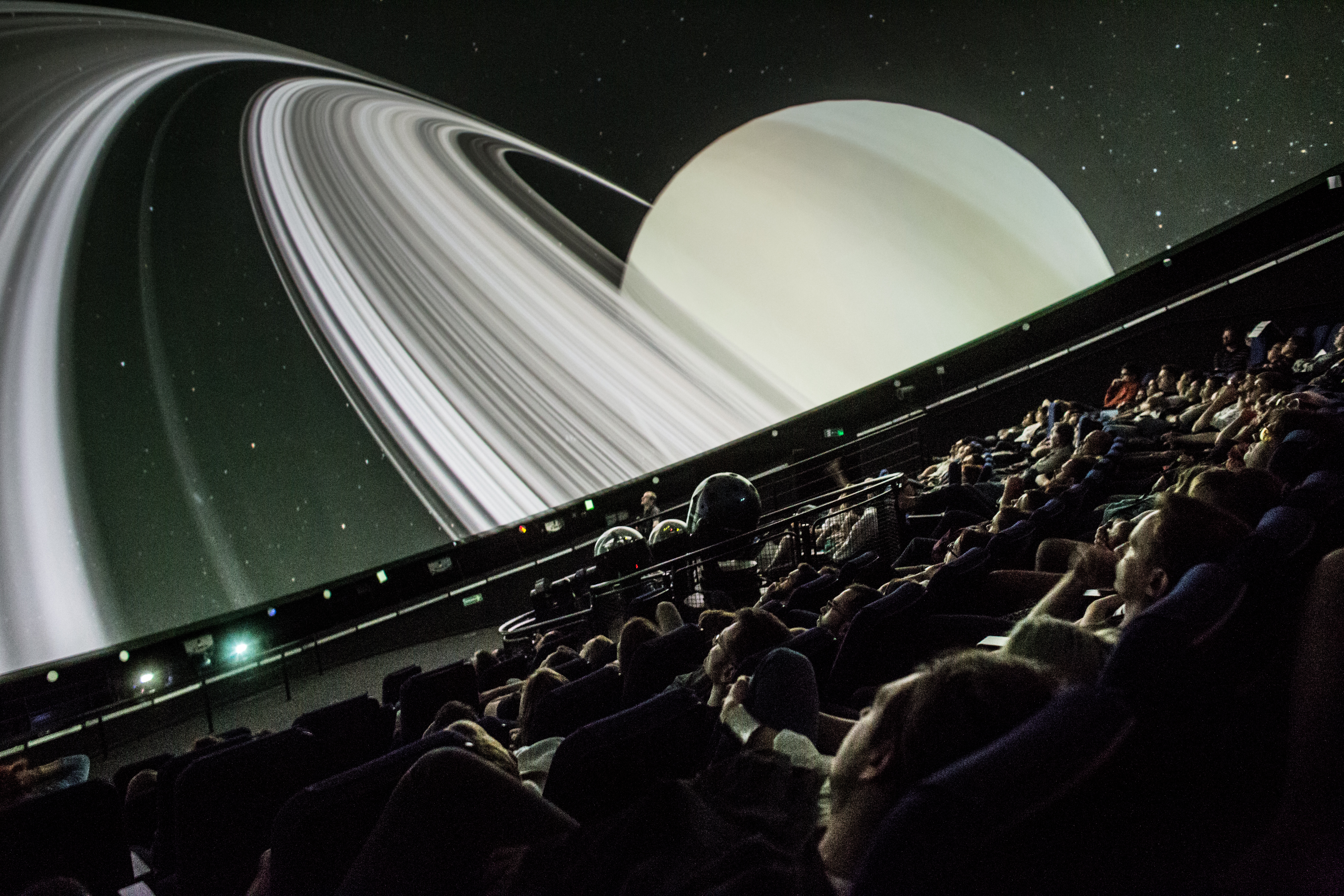 Wydarzenie "New Horizons w Planetarium". 14.07.2015, Planetarium, Centrum Nauki Kopernik w Warszawie. Fot. Adam Kozak